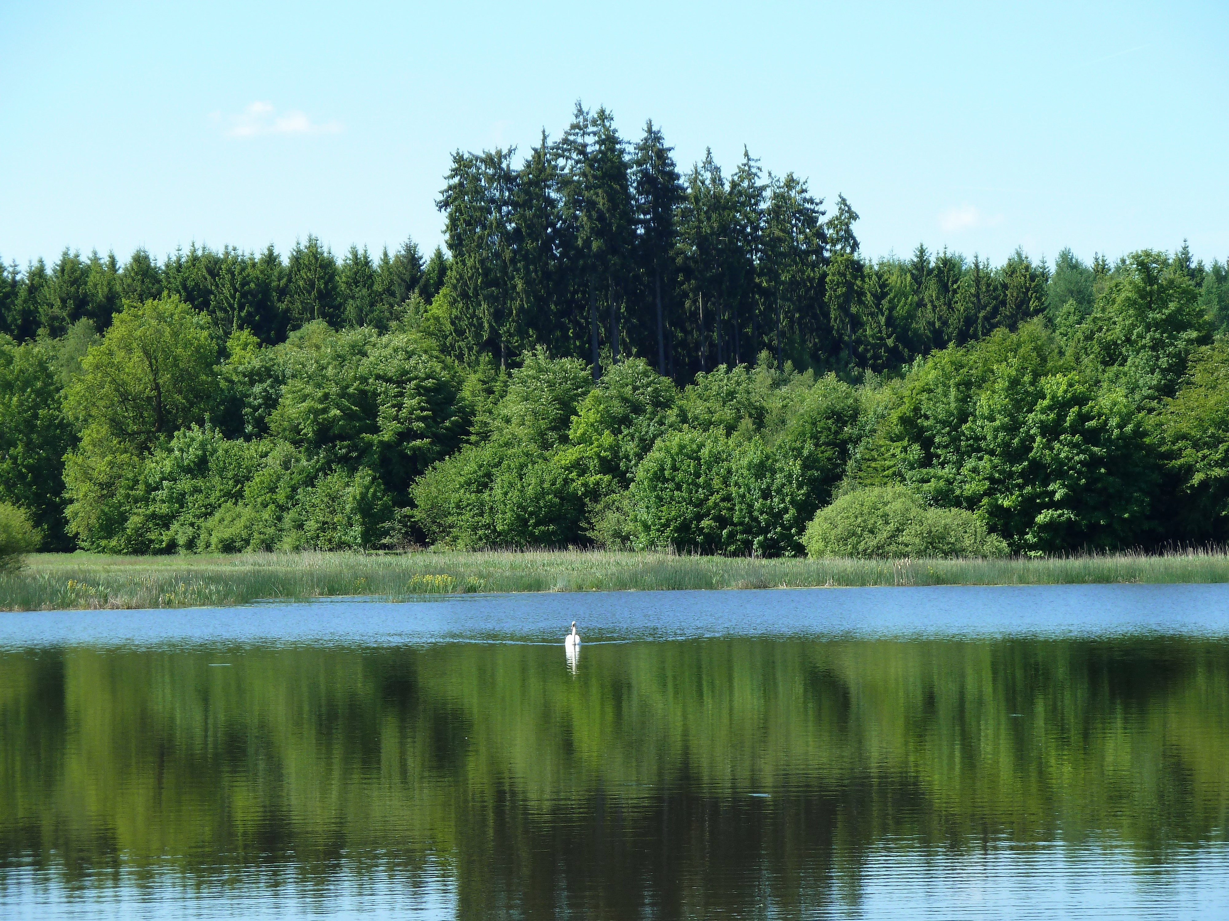 (NSG:BW-4.150)_Gutershofer Weiher, Cygnus olor in Baden-Württemberg